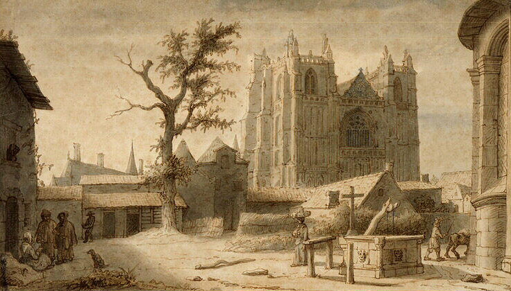 Lavis, aquarelle ; vue de la façade ouest de la cathédrale de Nantes et d'une portion de l'abside de la collégiale Notre-Dame.